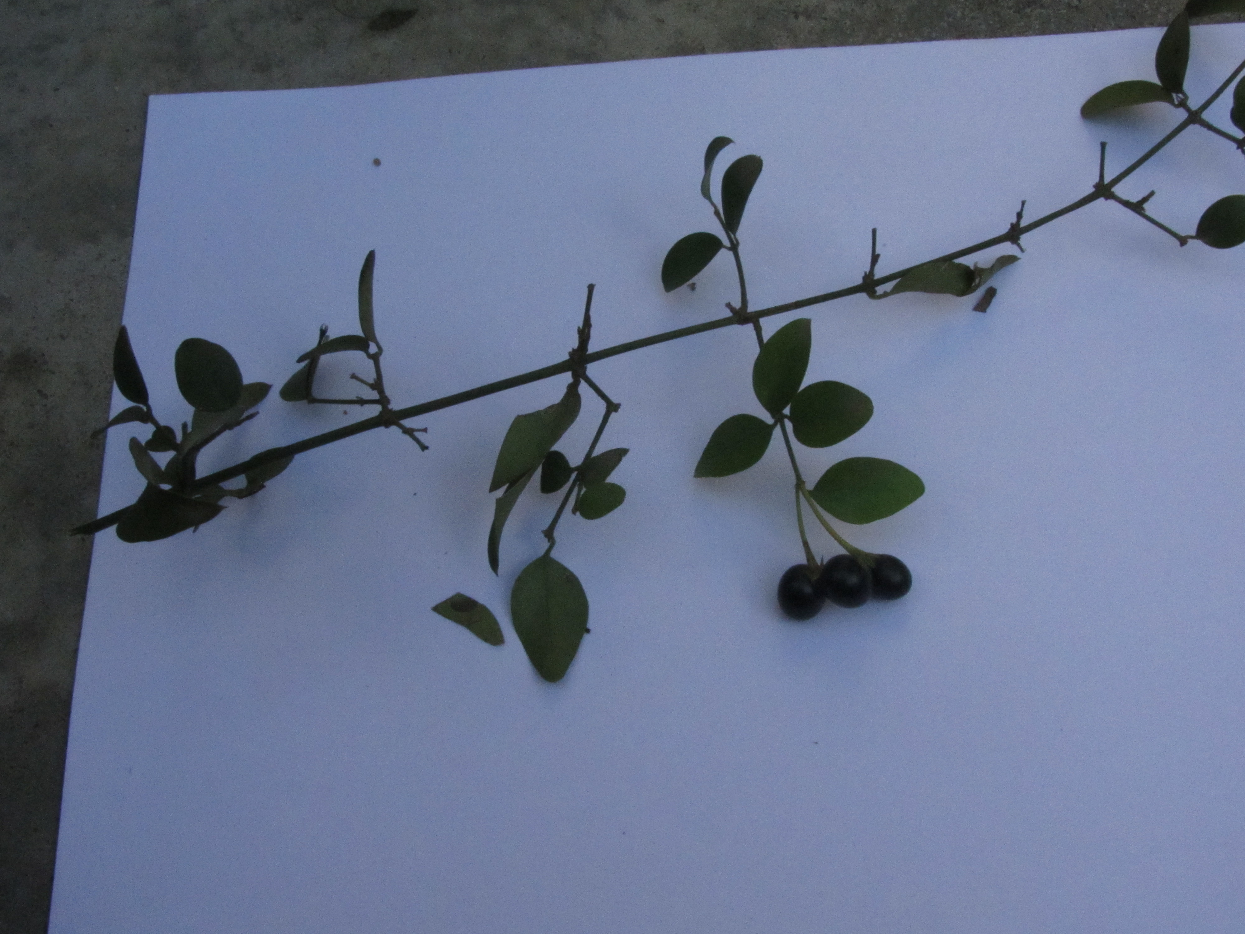 own shot சங்ககாலப் பாரி தேர் தந்த முல்லையில் இப்படிப் பழம் பழுக்கும்.